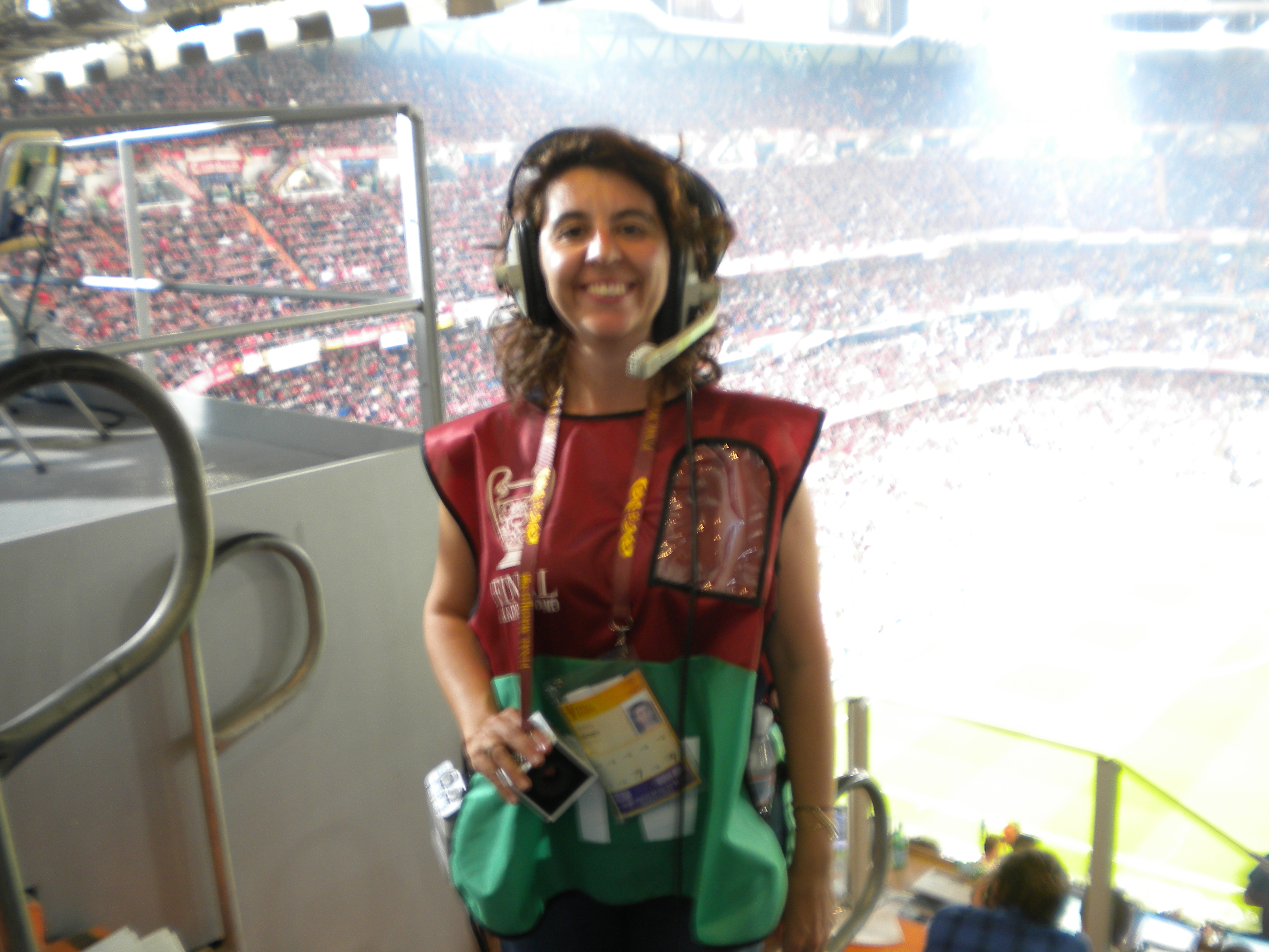 Haciendo de stage manager